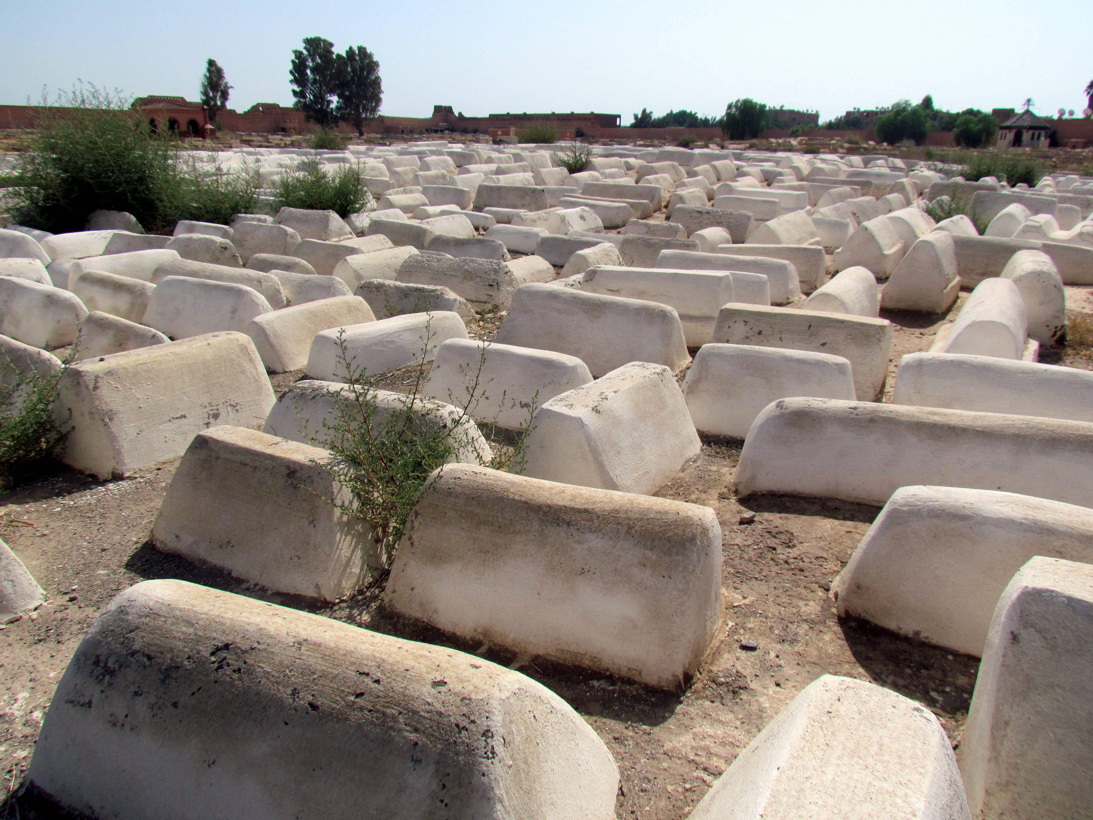 (cc) David Berkowitz - /